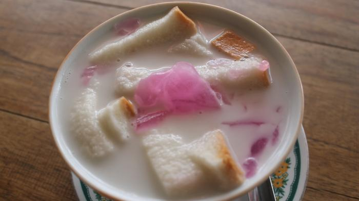 Wedang Asle